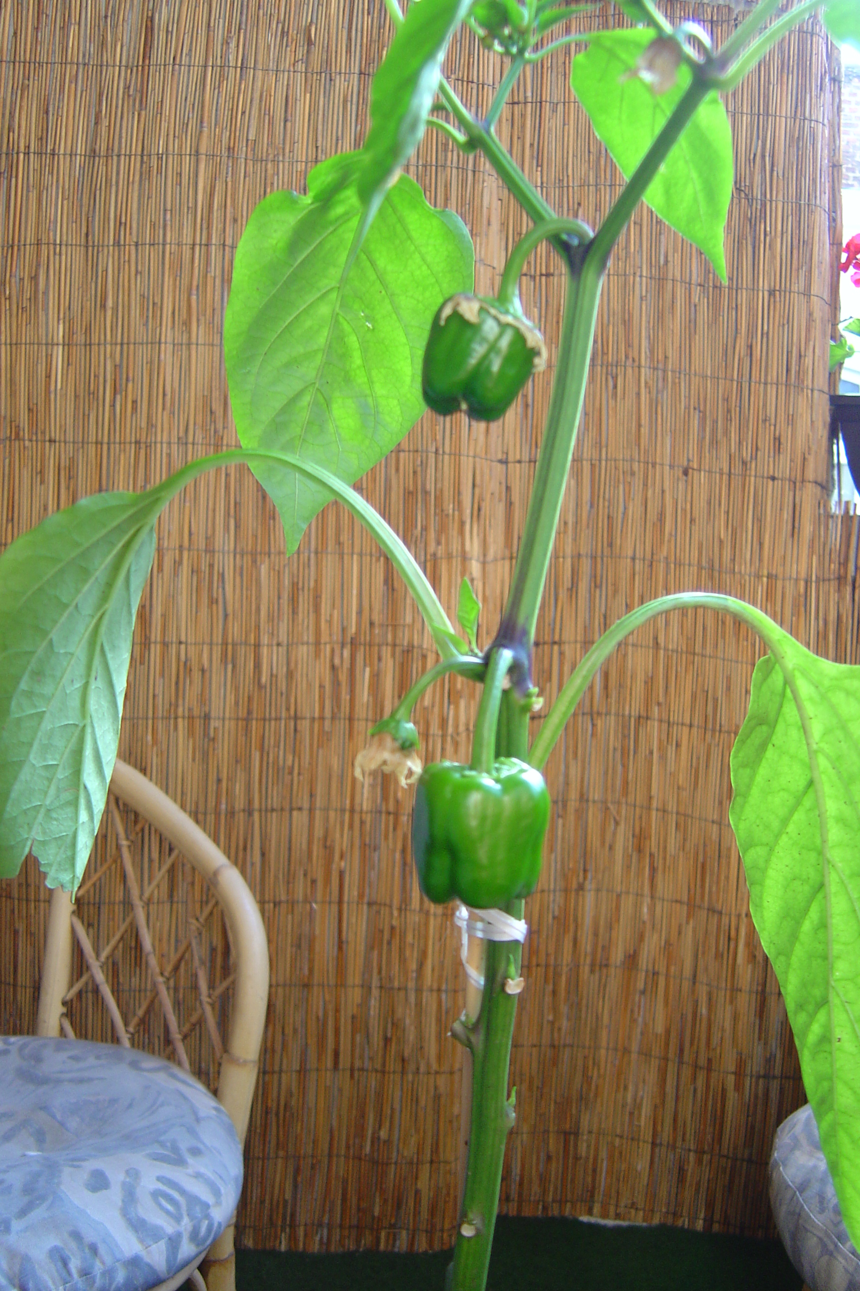 Poivrons se formant Auteur: Dorian Claeys